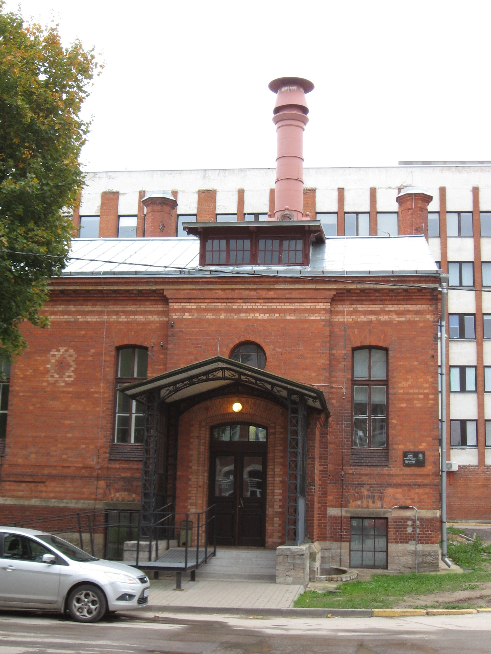 Kreenholmi vana haigla. Kalda tn 3. Sissepääs